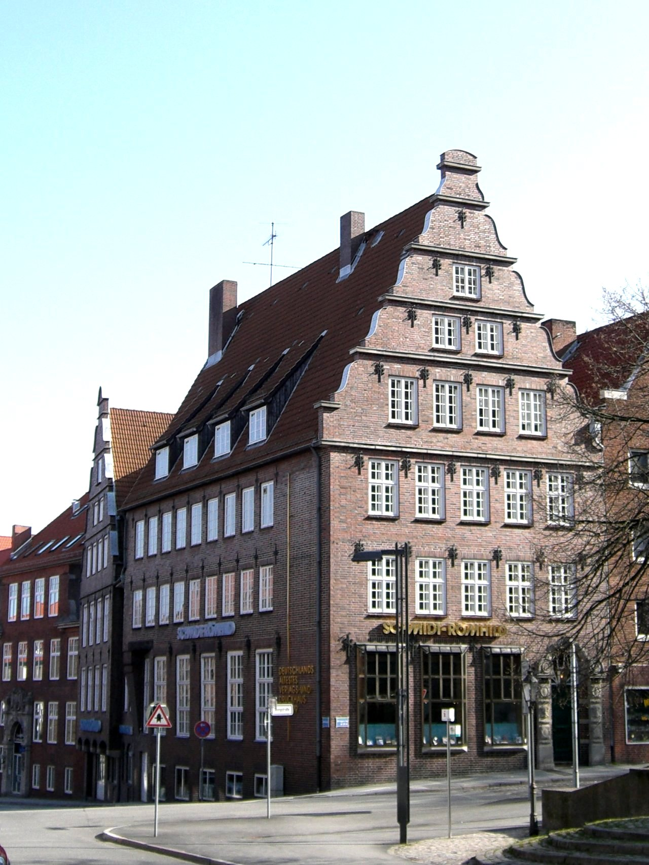 Verlagshaus an der Mengstraße 1907 selbst aufgenommen April 2005